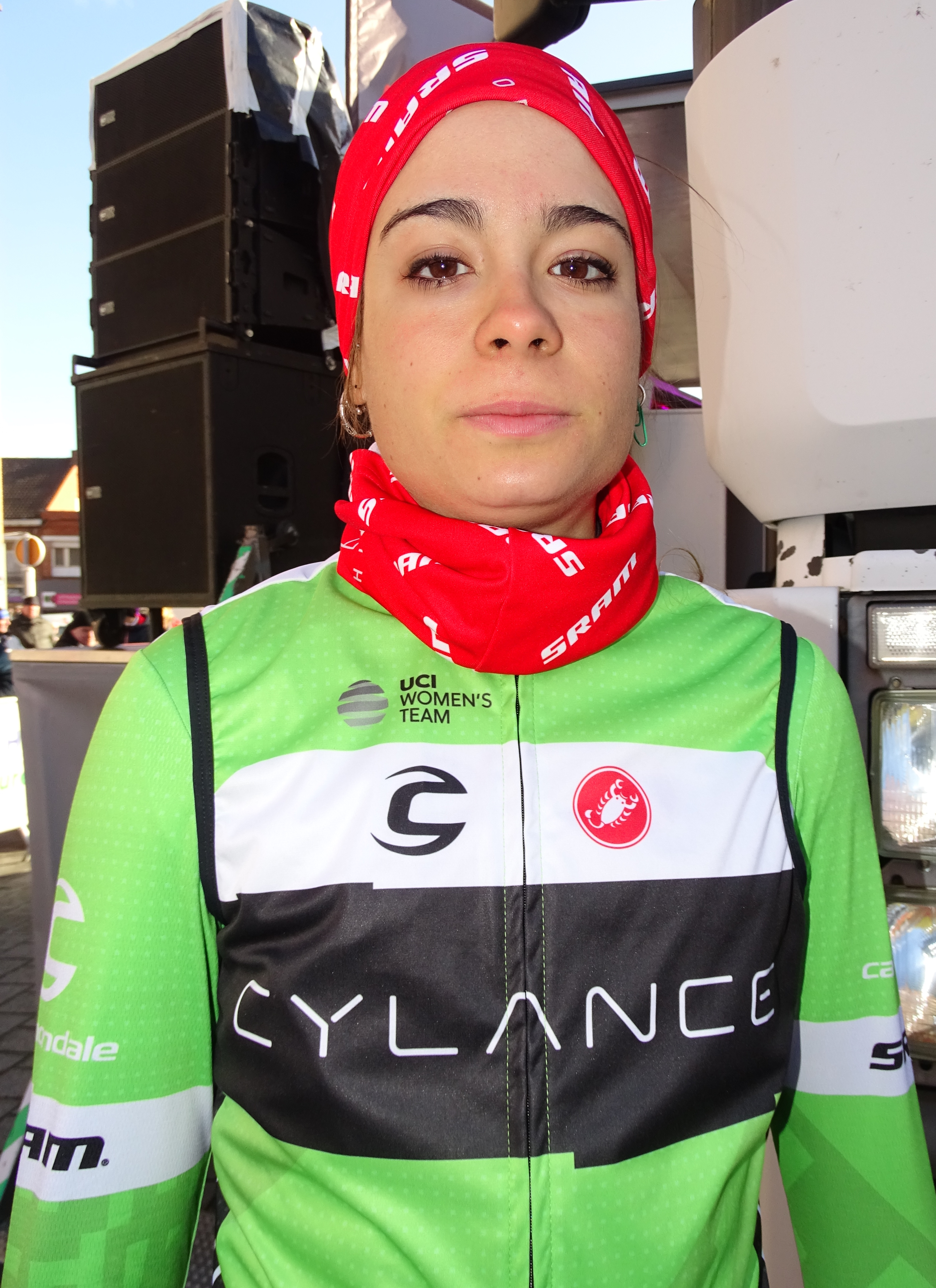 Reportage réalisé le mercredi 2 mars à l'occasion du départ du Samyn des Dames 2016 et du Samyn 2016 à Quaregnon, Belgique.